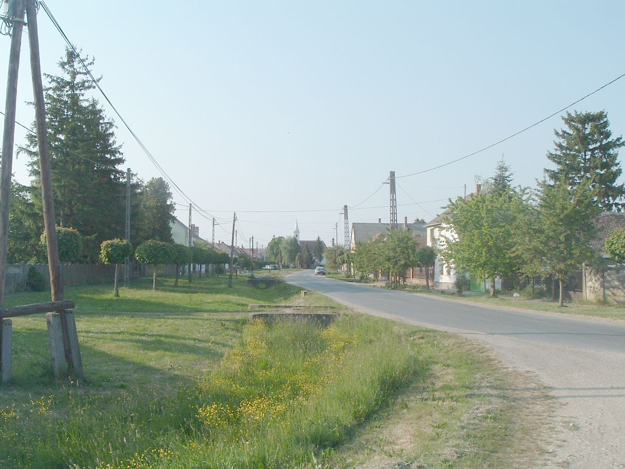 Meszlen, Hungary